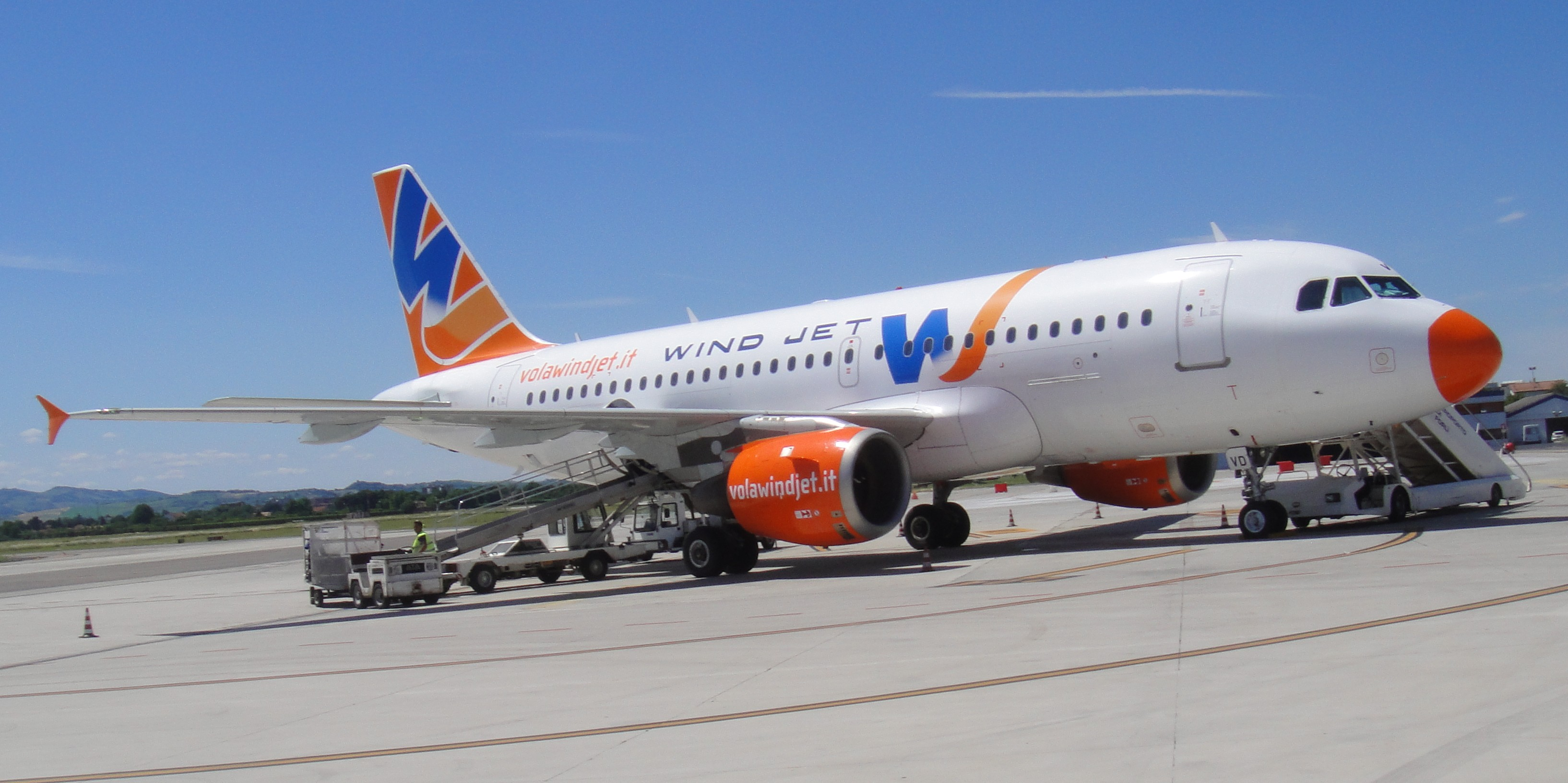 Airbus A319-113 EI-DVD della Wind Jet all'aeroporto "L. Ridolfi" di Forlì (FC) Italia